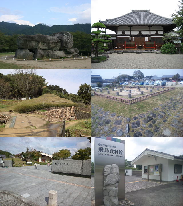 明日香村の文化財・施設